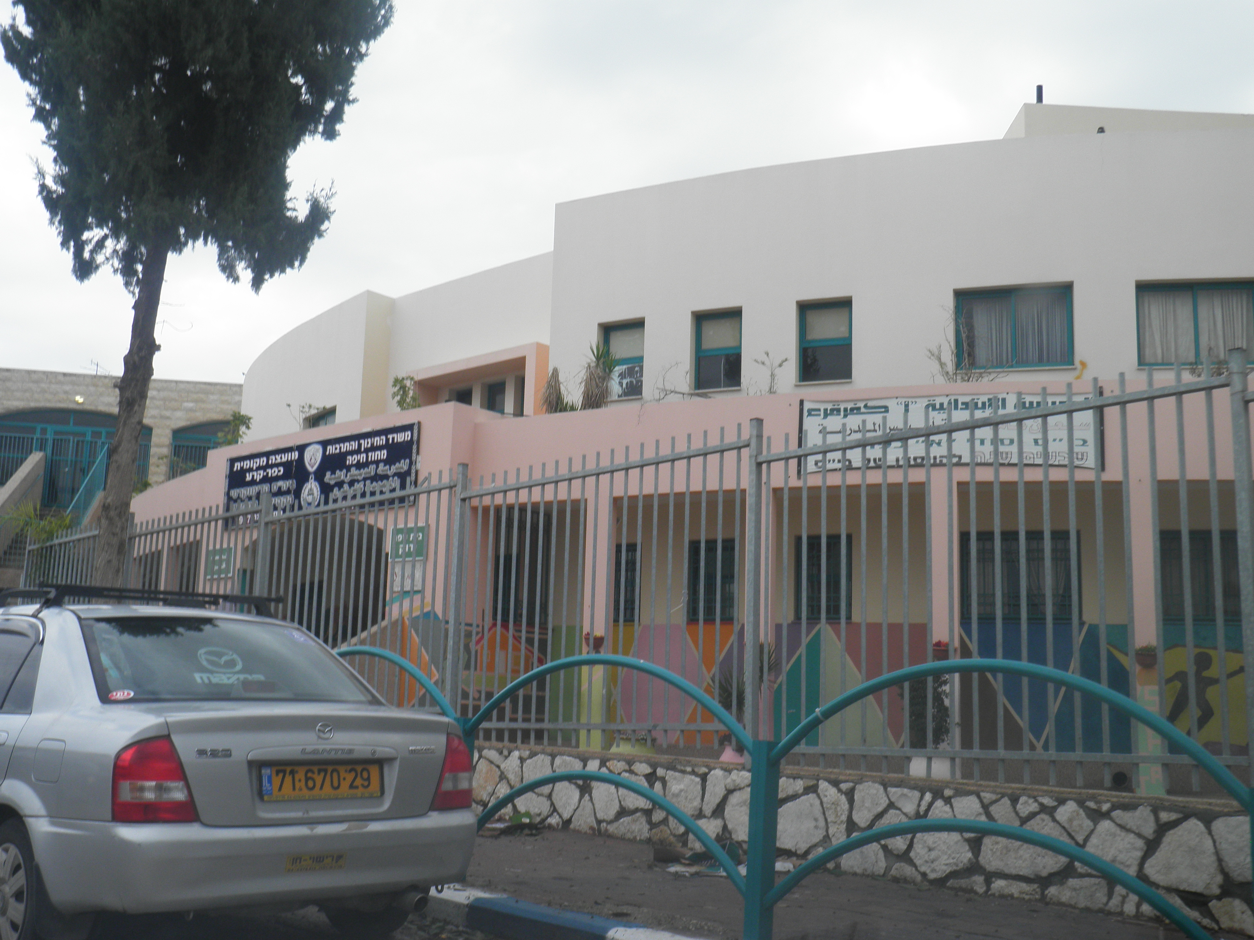 כפר קרע